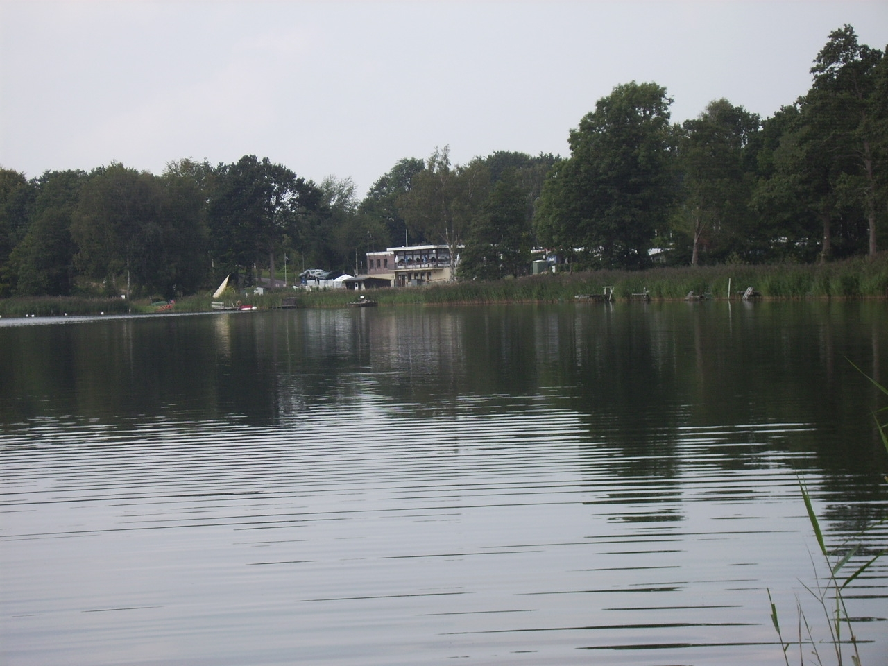 Borgdorfer See bei Nortorf (Kreis Rendsburg-Eckernförde)